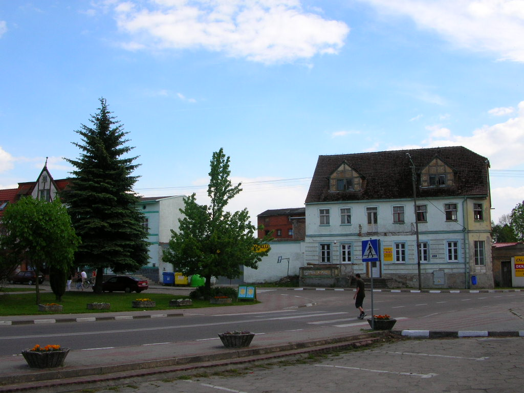 Krajenka - Rynek Autor - Bartek Wawraszko